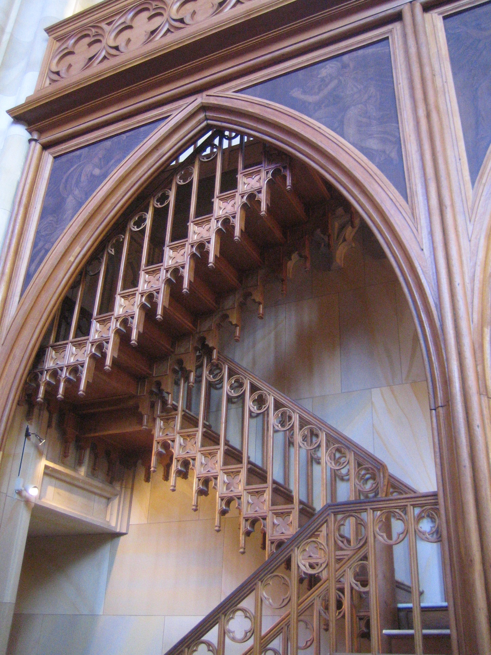 Die Friedrichswerdersche Kirche in Berlin-Mitte, erbaut von Karl Friedrich Schinkel. Aufgang zur Galerie.